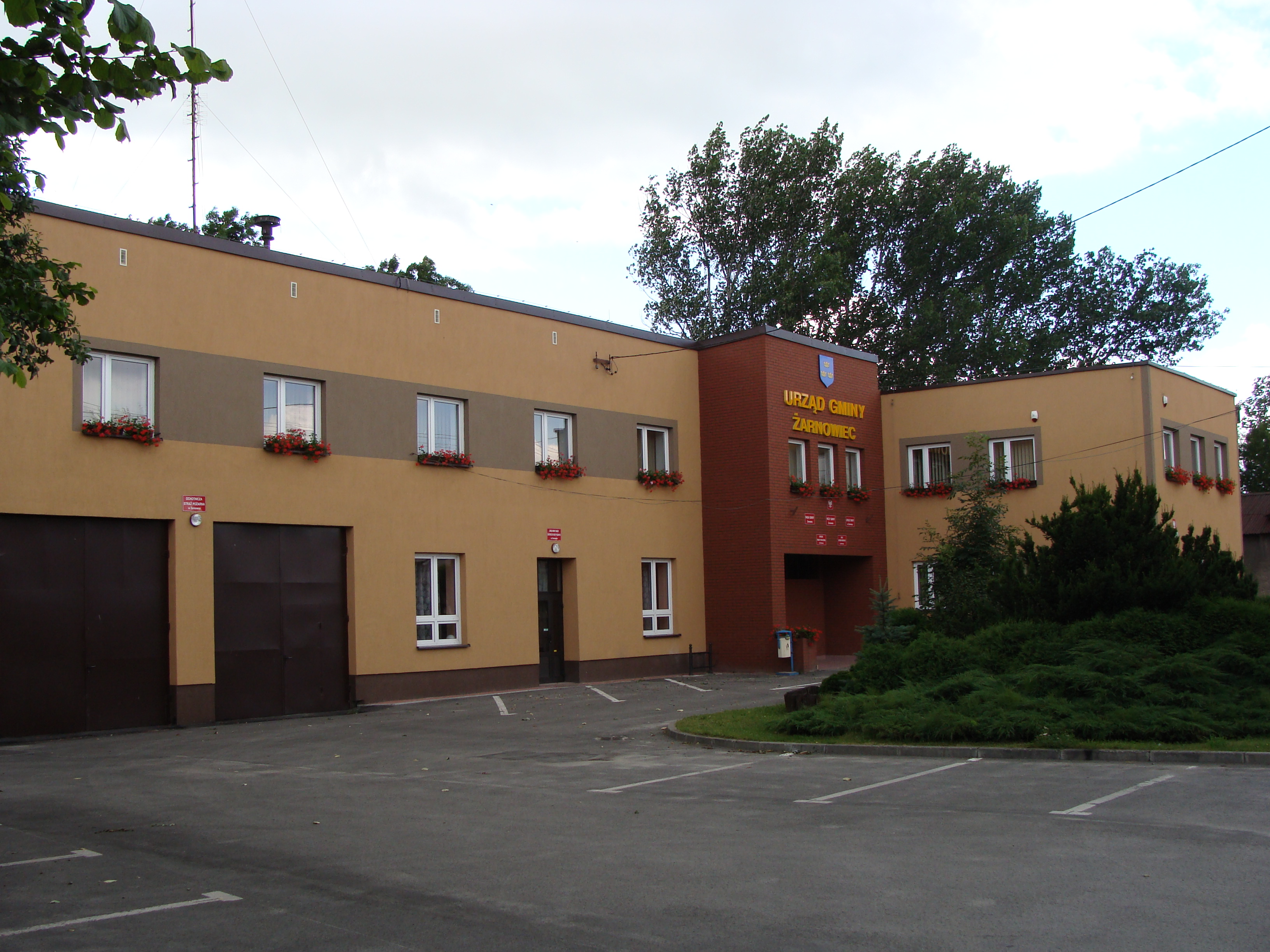 Urząd Gminy w Żarnowcu